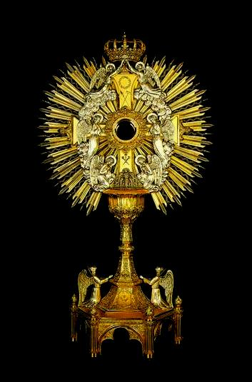 Custódia do IV Congresso Eucarístico Nacional, 1942. Ostensório projetado em Roma por Cleto Luzzi, e fabricado no Rio Grande do Sul. Possui 99 cm de altura e pesa 6,8 kg. Executado com 4,3 kg de ouro 18 quilates, 2 kg de prata, 32 g de platina, 56 g de ouro branco, 208 g de prata platinada, 1482 brilhantes e 1710 diamantes. Oferta dos católicos de São Paulo. Acervo do Museu de Arte Sacra de São Paulo, Brasil.